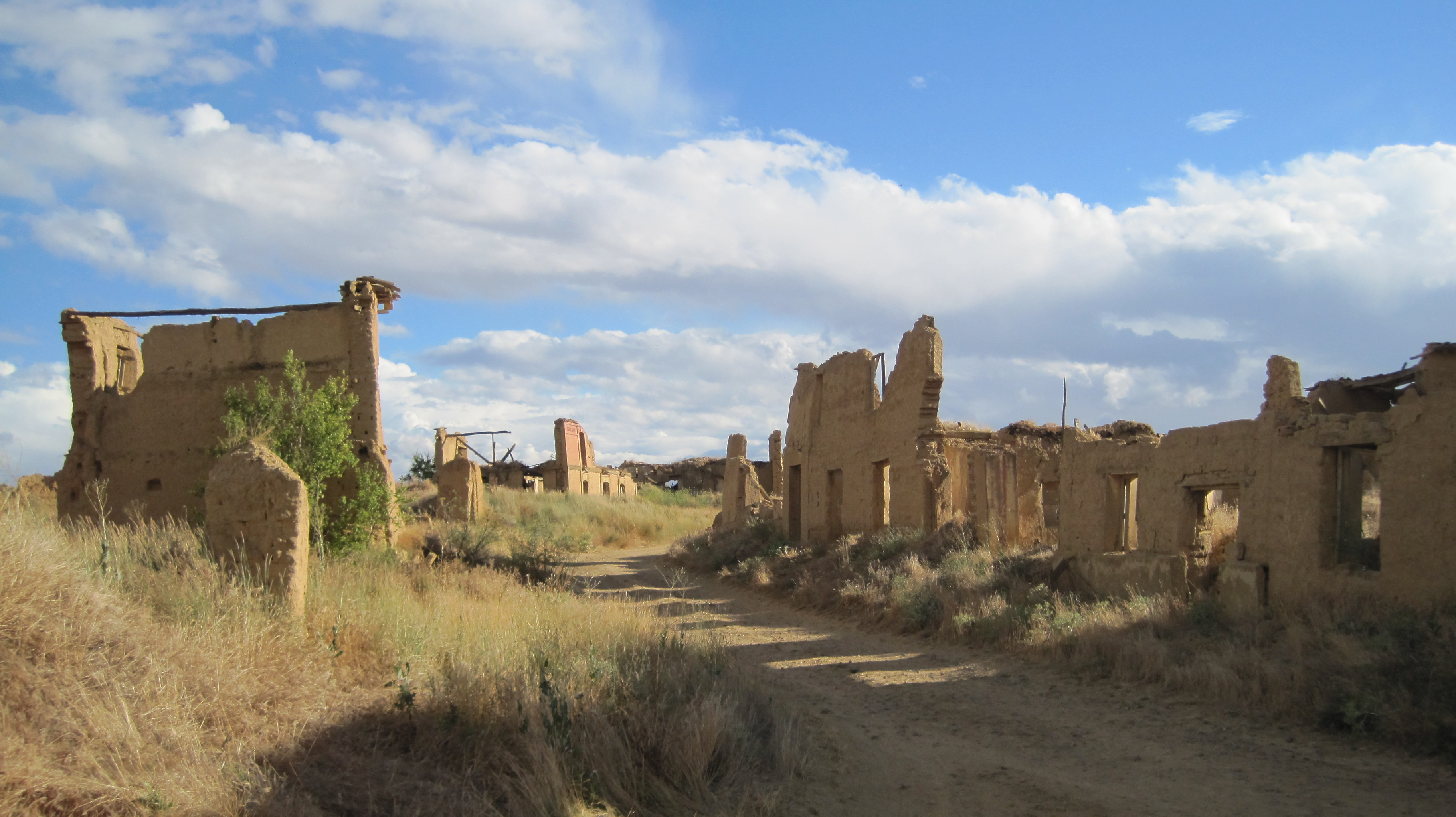 Despoblado de Villacreces (Valladolid, España).